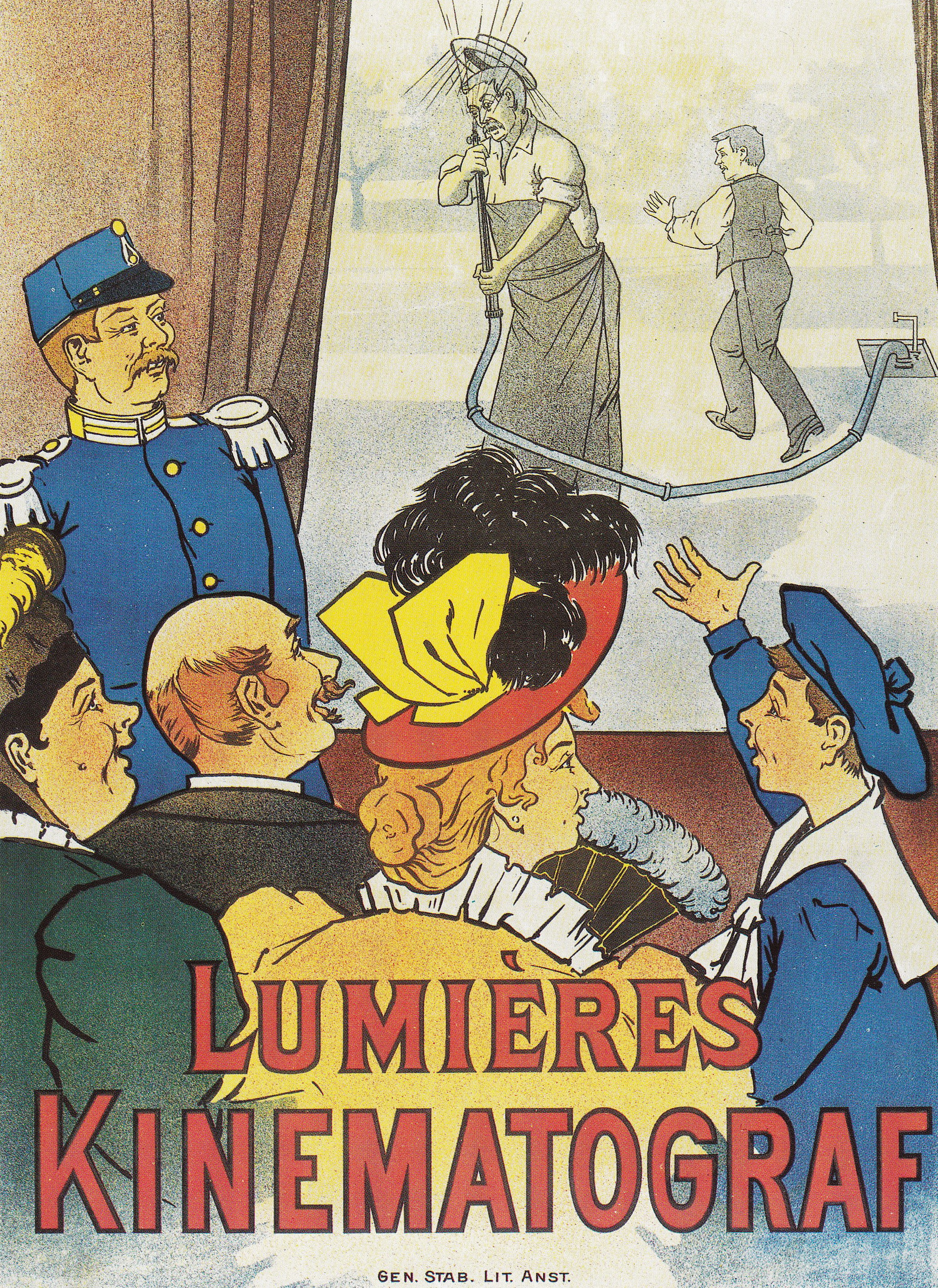 Sveriges första filmaffisch till Lumières Kinomatograf på Stockholmsutställningen 1897